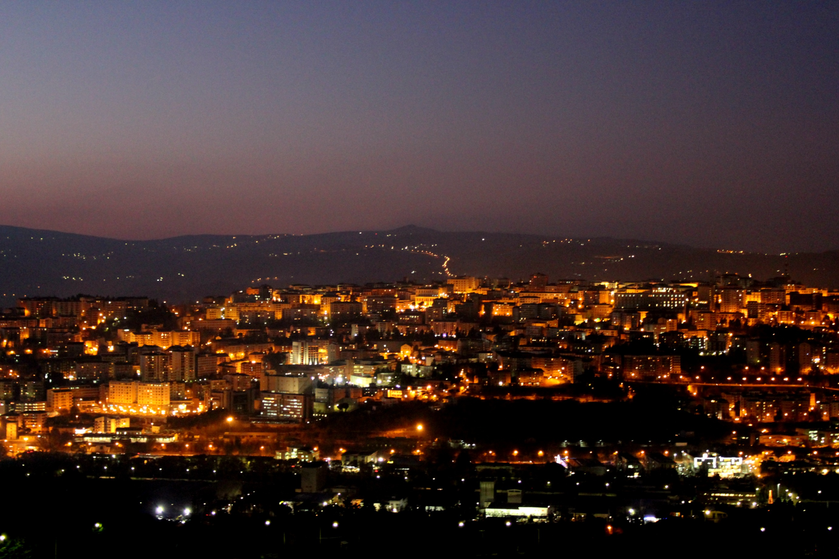 Panorama del capoluogo di regione della Basilicataquesta è potenza,una delle città più piccole dell'italia.